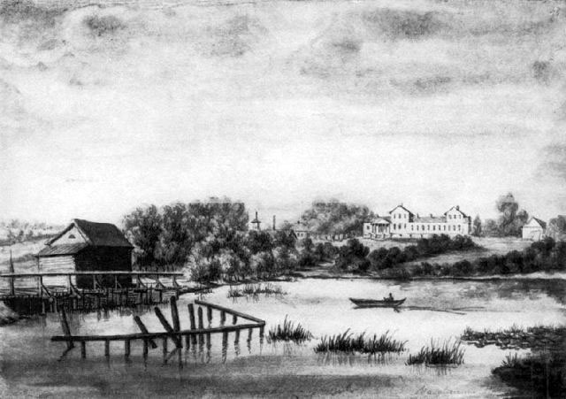 Дворец Техановецких д. Масальщина, Могилевский район (не сохранился). Рисунок Н. Орды, 1877 г.